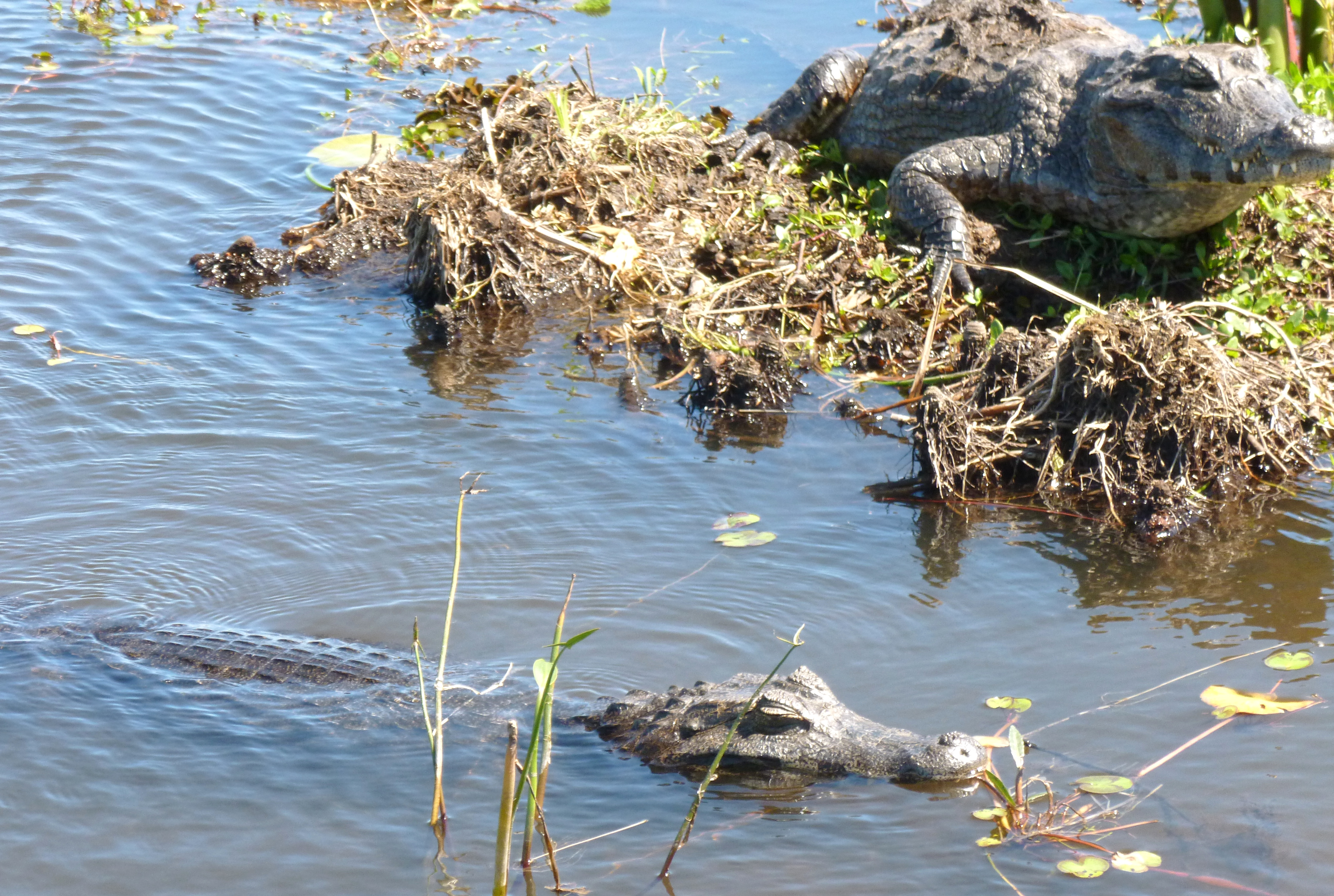 YACARE de los ESTEROS DEL IBERA ( el segundo mayor humedal del mundo,) provincia de Corrientes, Argentina.